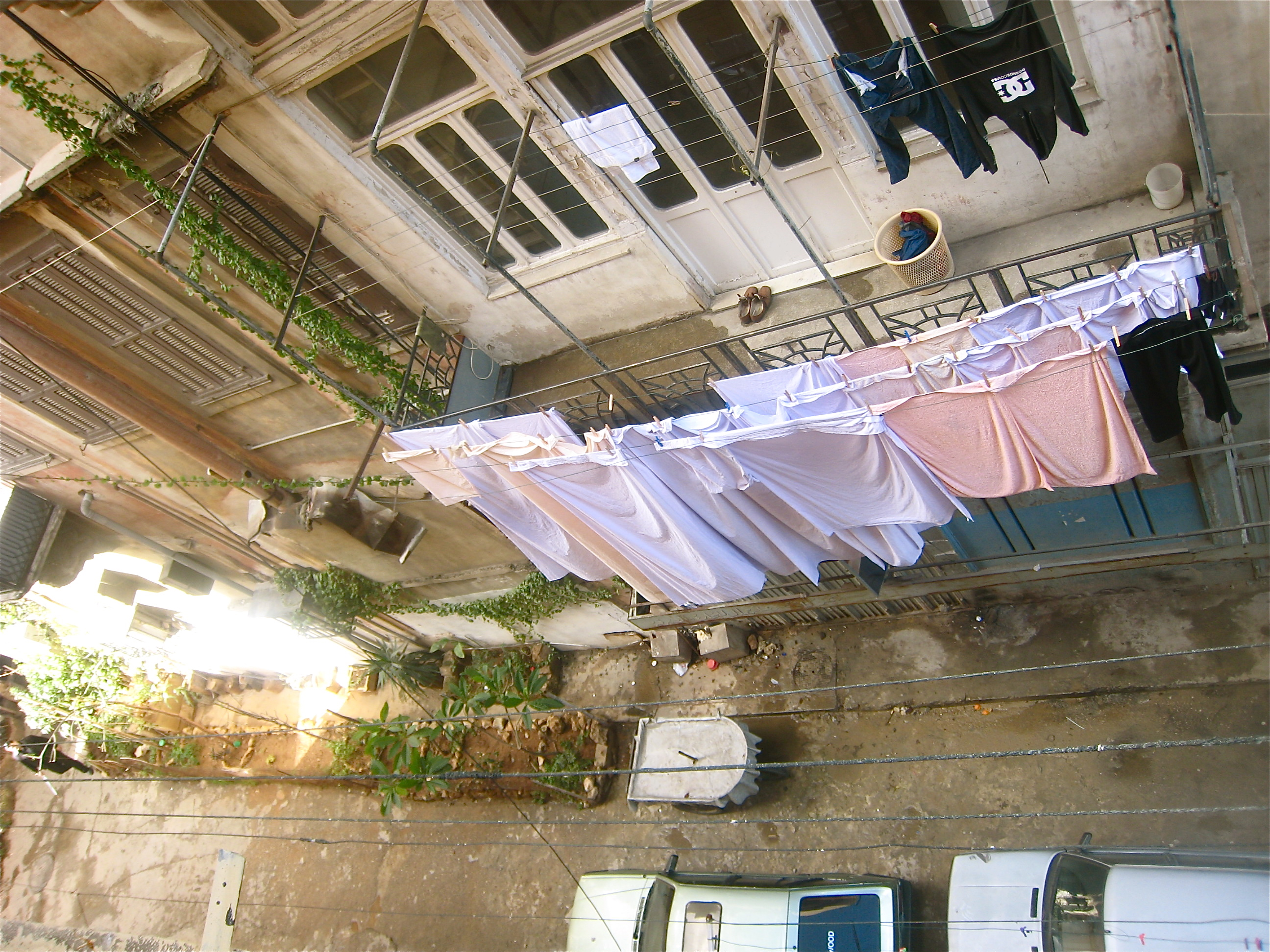 Drying laundry in Tripoli, Lebanon